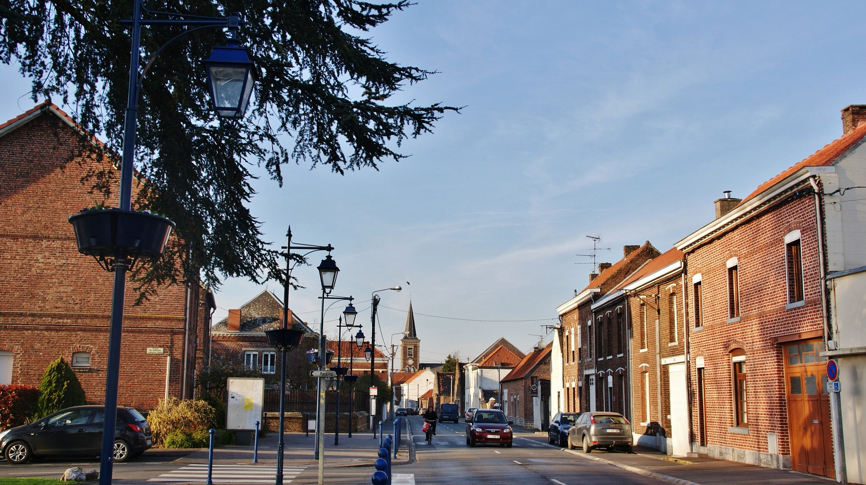 La Commune